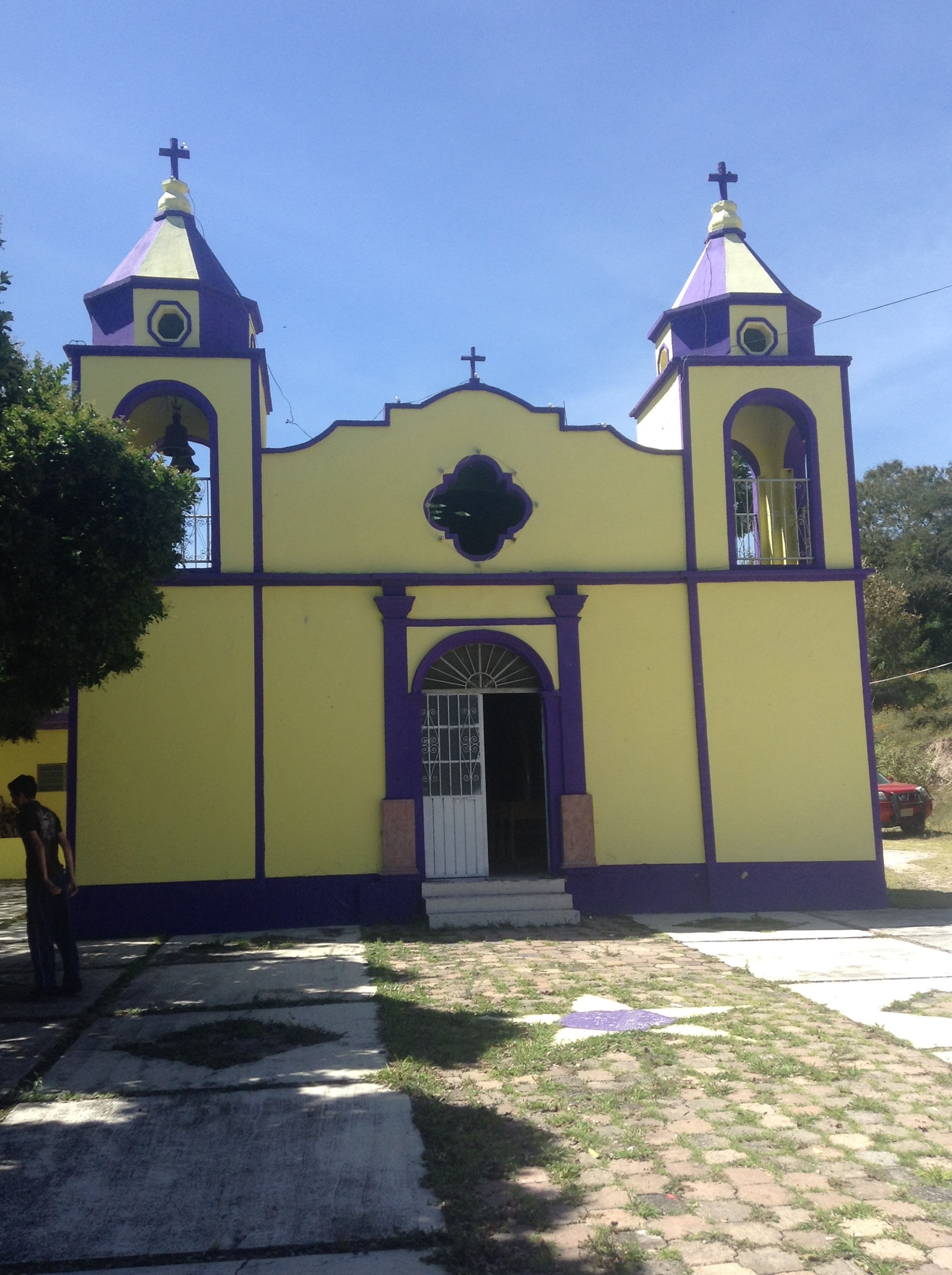 En la imagen se puede observar la iglesia de San José en la comunidad de Ajacayan, lugar famoso por su feria de toritos de fuegos pirotécnicos.